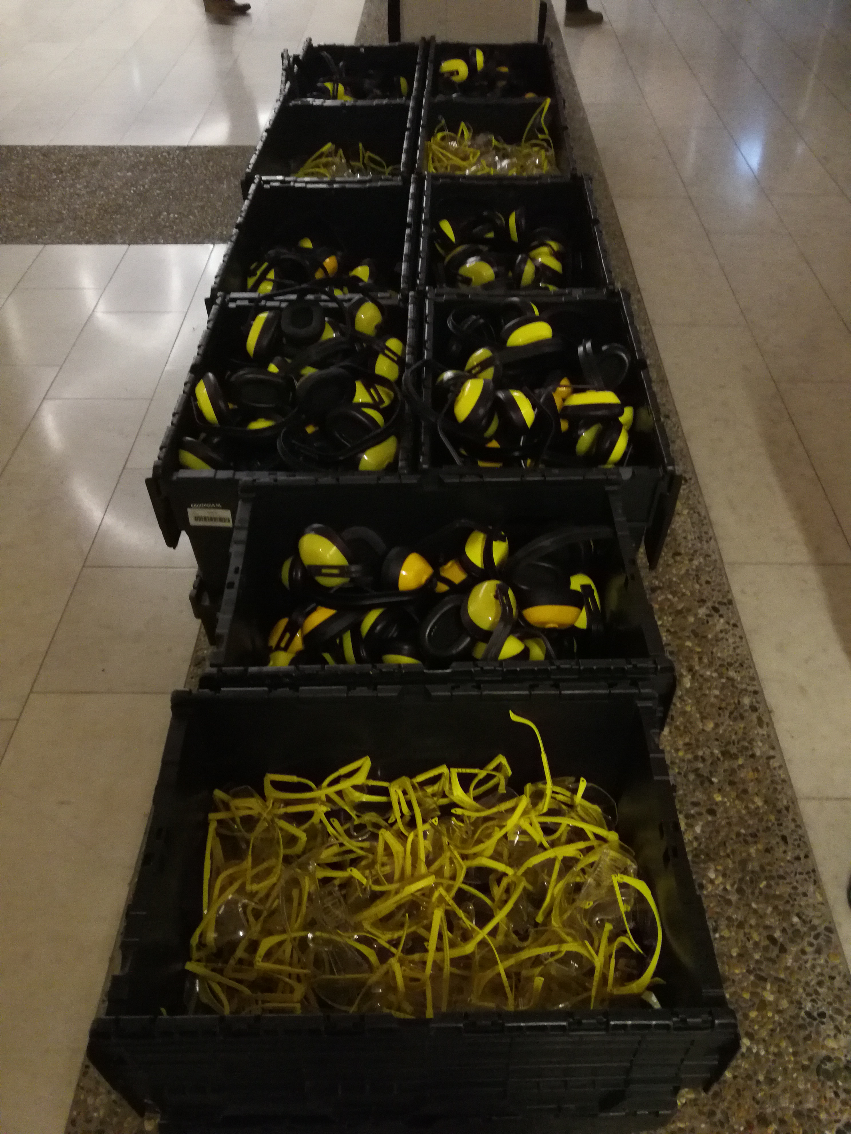 Kisten met gehoorbeschermers en veiligheidsbrillen voor aanvang van een voorstelling van Checkpoint (8+) in de Stadsschouwburg Nijmegen